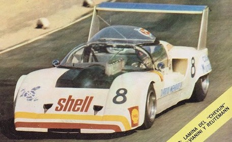 Numa IIB-Tornado de Carlos Ruesch en el Autódromo Oscar Cabalén de Córdoba, temporada 1969 de Sport Prototipo Argentino.